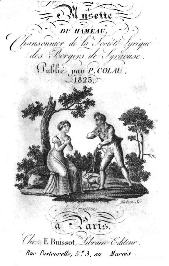 Page d'introduction de La Musette du Hameau recueil de la goguette des Bergers de Syracuse, Paris 1825.